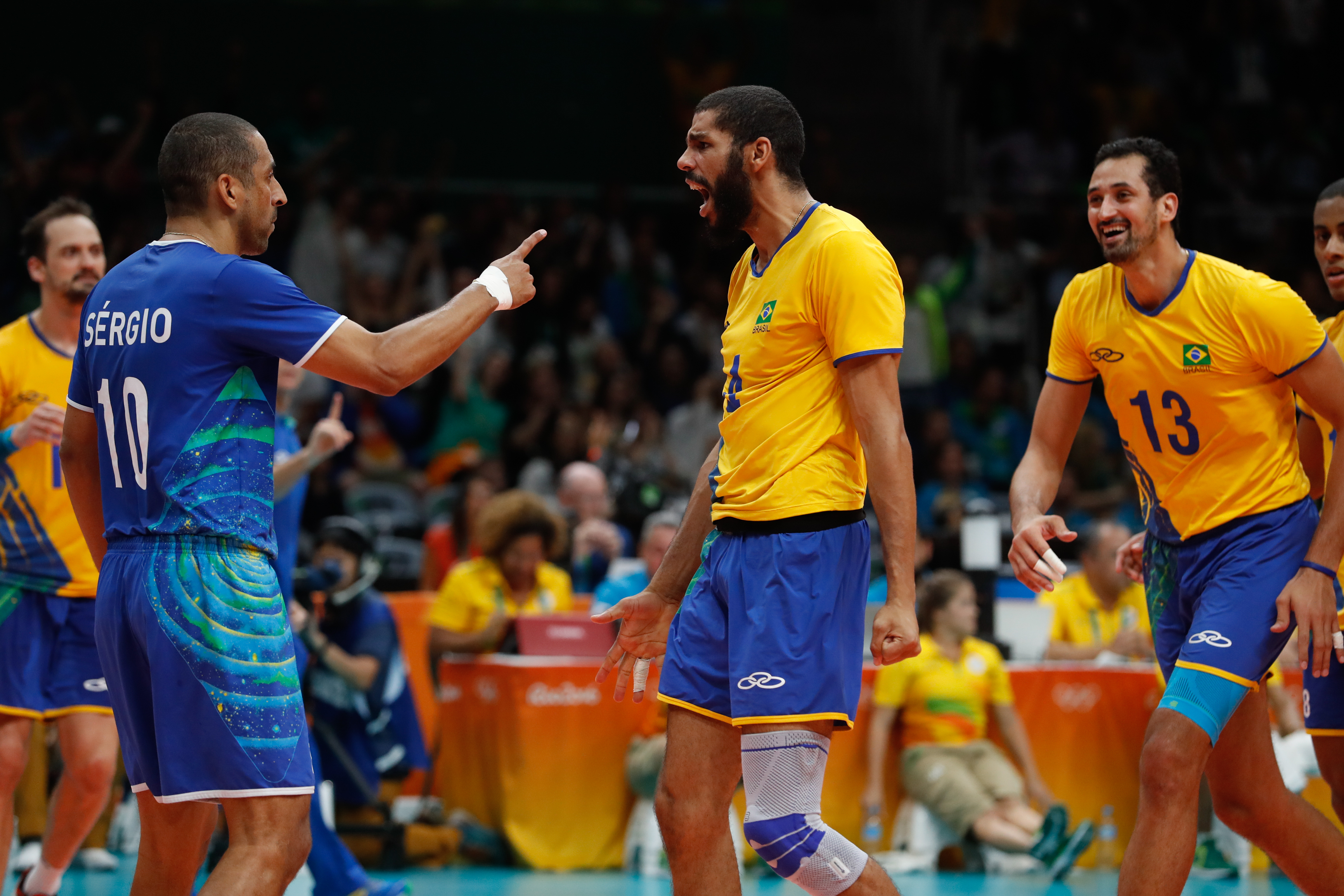 Rio de Janeiro - Seleção brasileira masculina de vôlei vence a da França por 3 sets a 1 no Maracanãzinho e vai às quartas-de-final (Fernando Frazão/Agência Brasil)